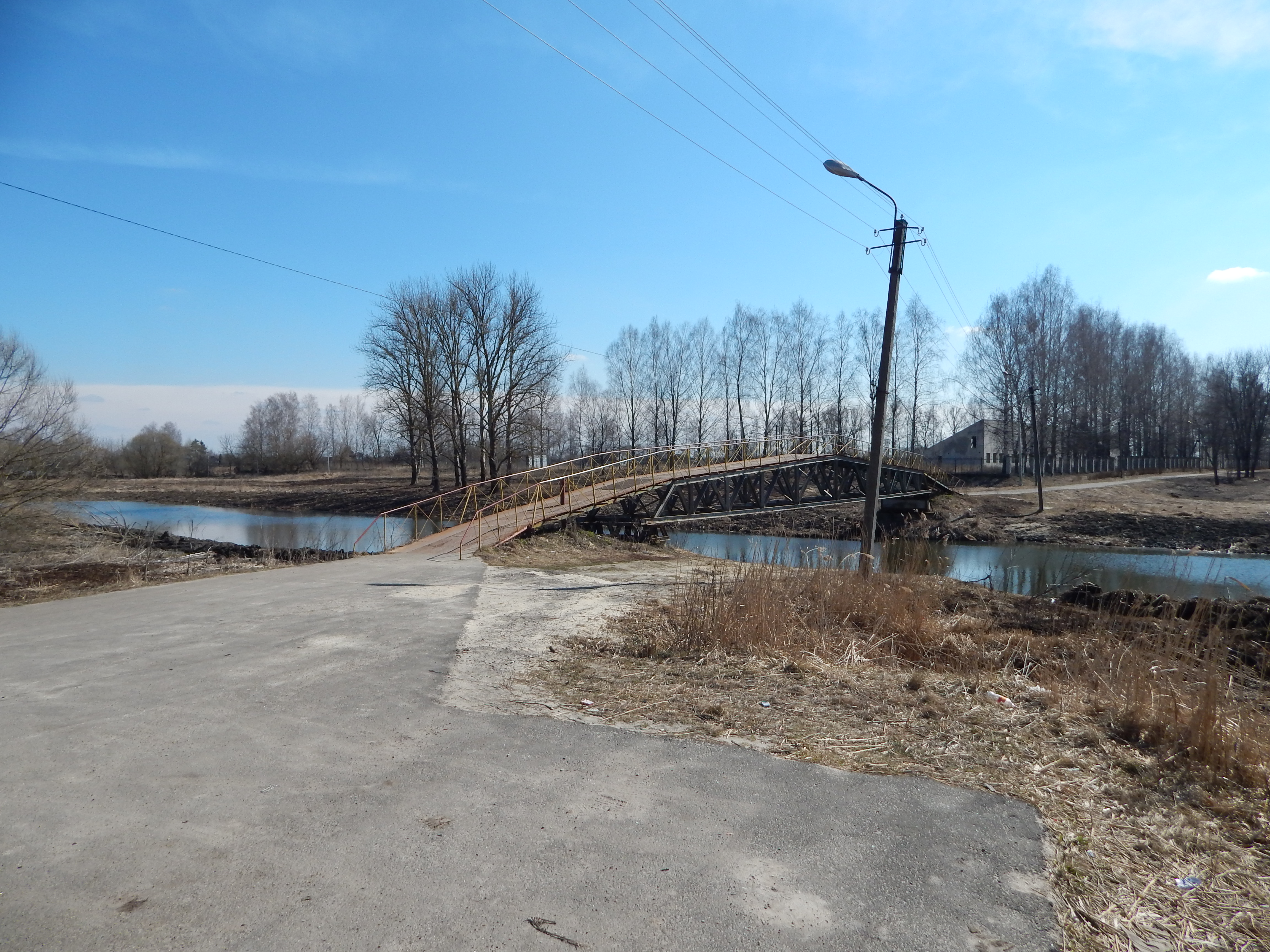 Karachev, Bryansk Oblast, Russia